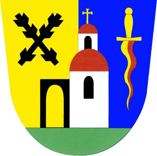 znak, Vracovice, okres Znojmo